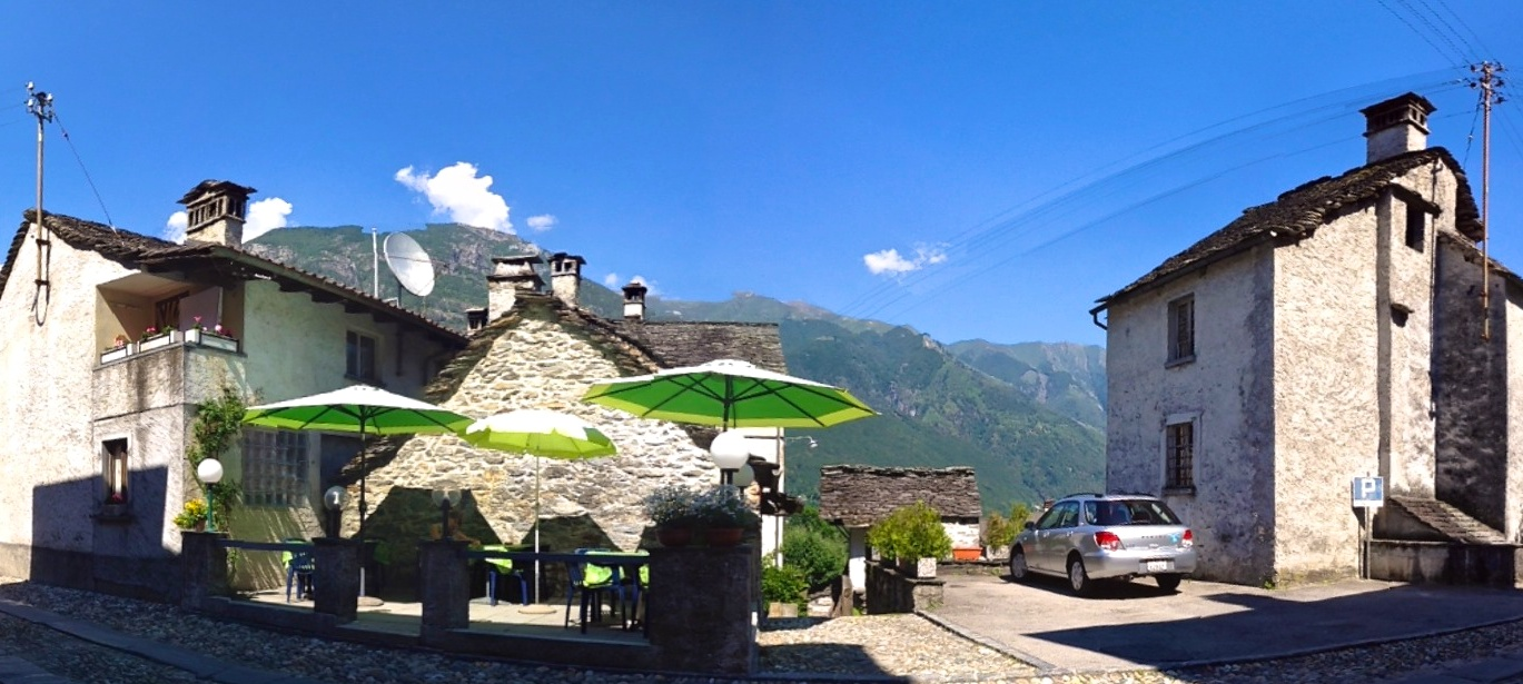 Aurigeno